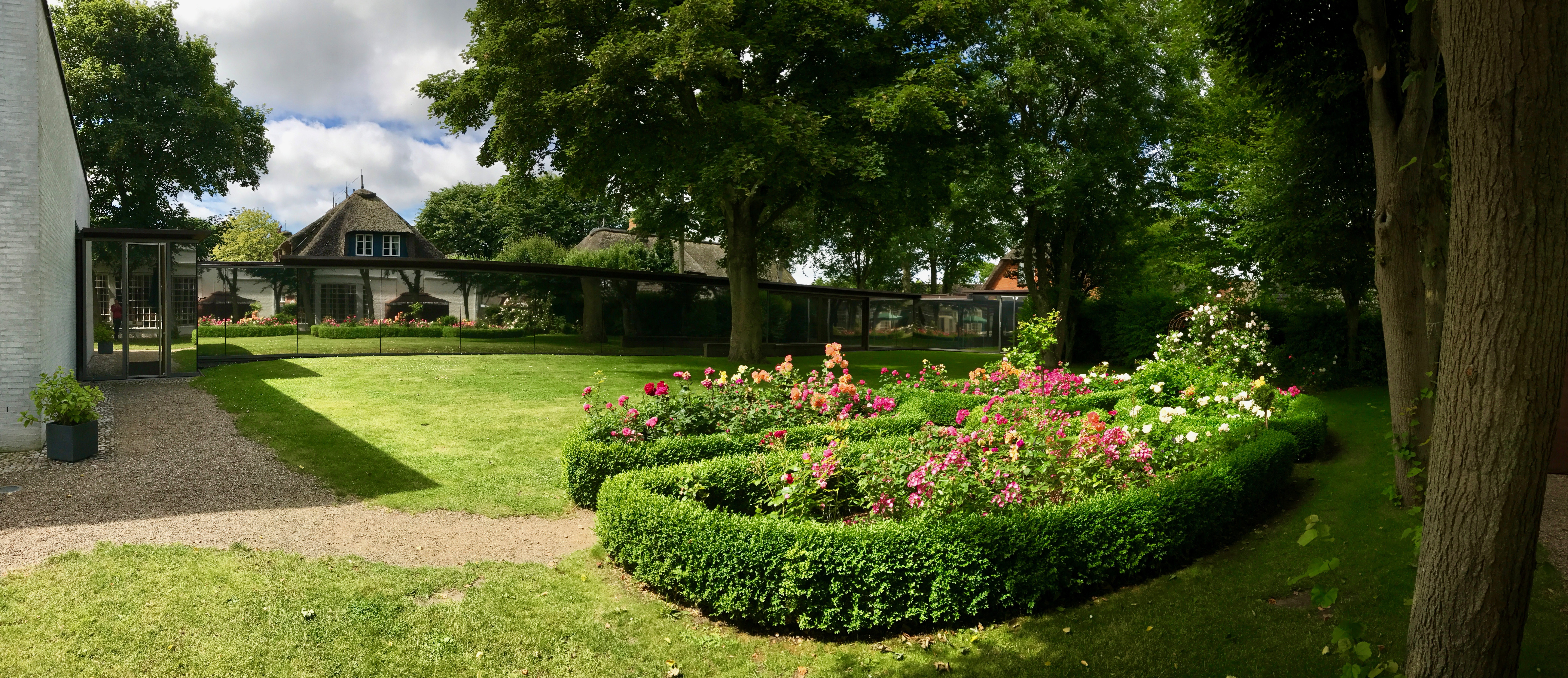 Der Innenhof des Museums Kunst der Westküste auf Föhr.